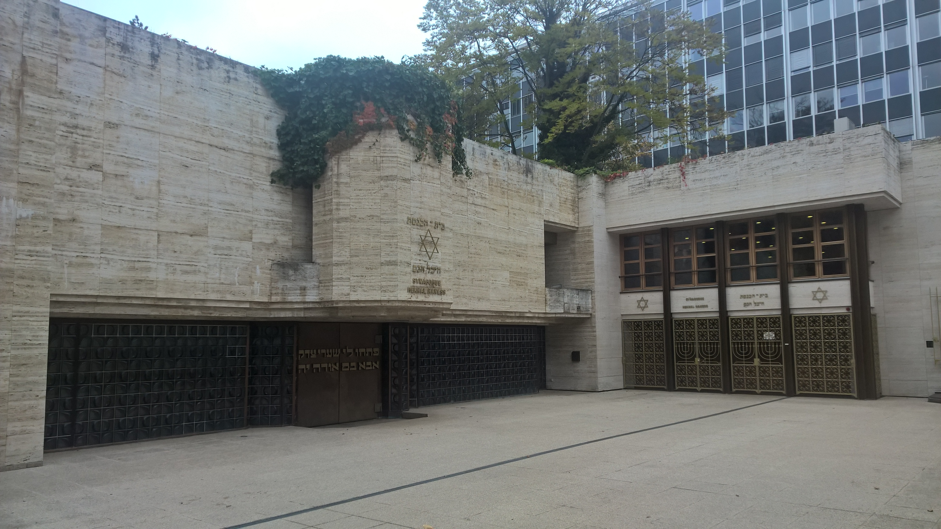 Synagogue Séfarade Hekhal Haness Genève